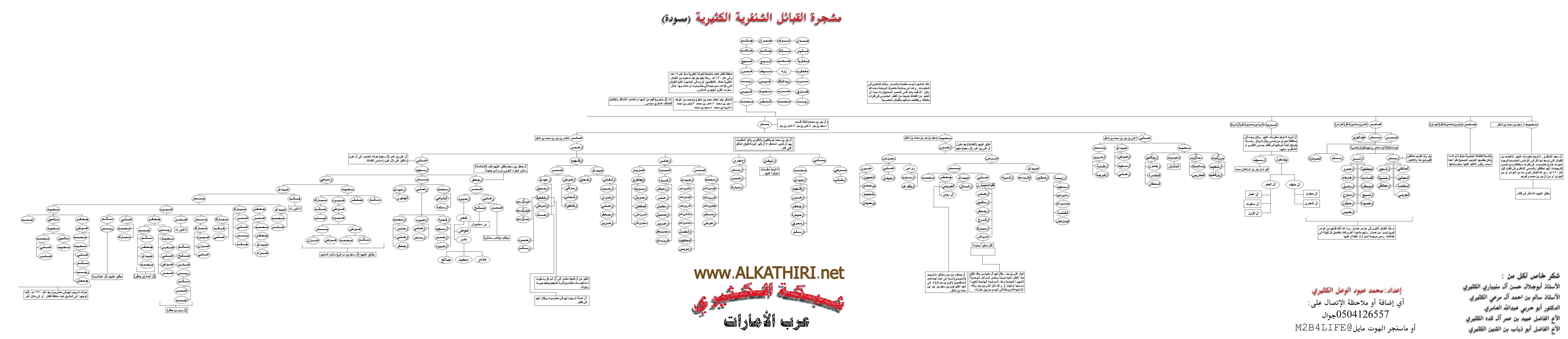 شجرة قبيلة أل كثير الشنافر و العوامر و الجوابر و بن شرية